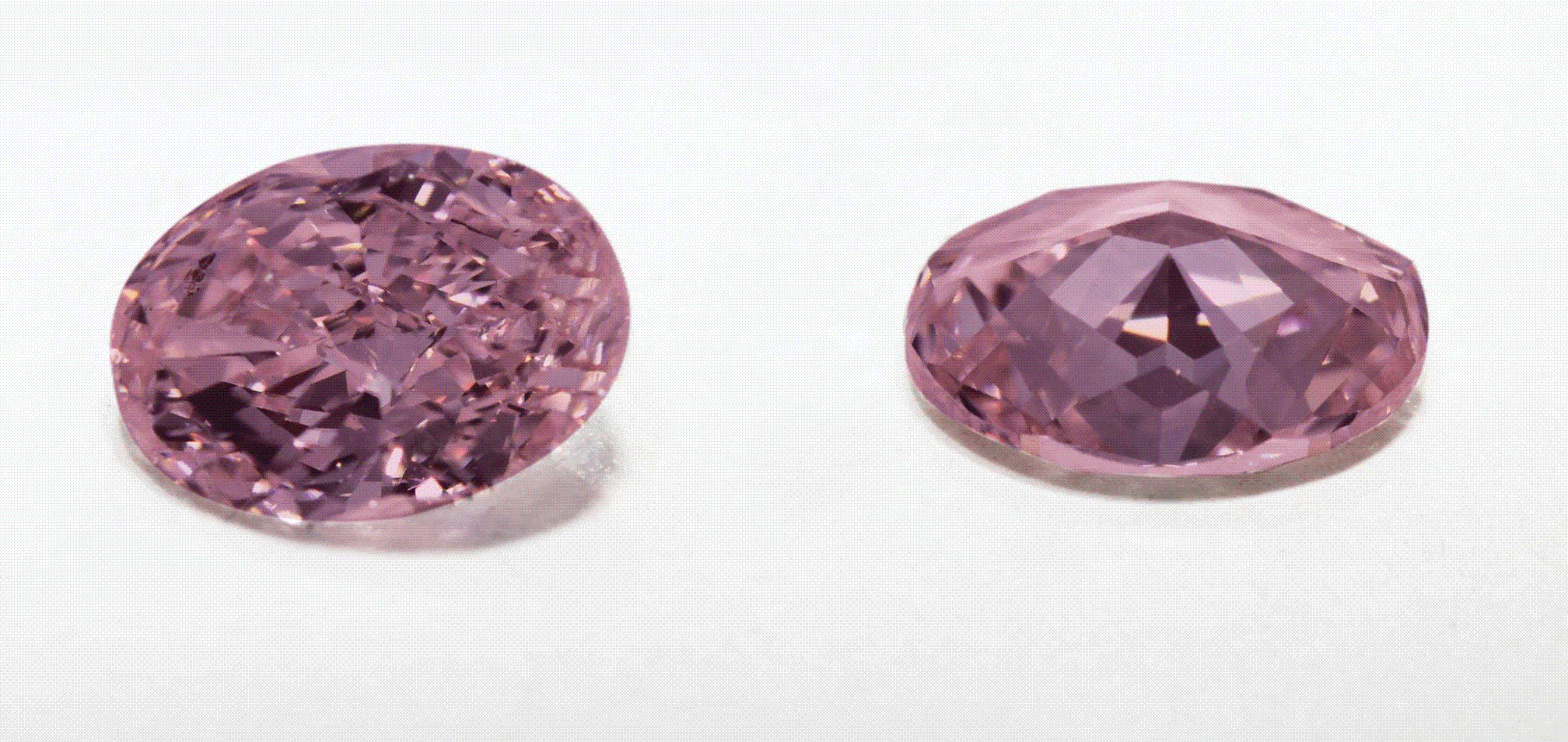 pink vivid diamonds